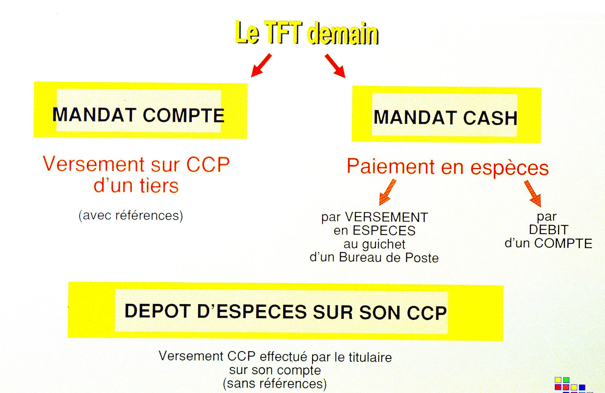 Diagramme synthèse du TFT